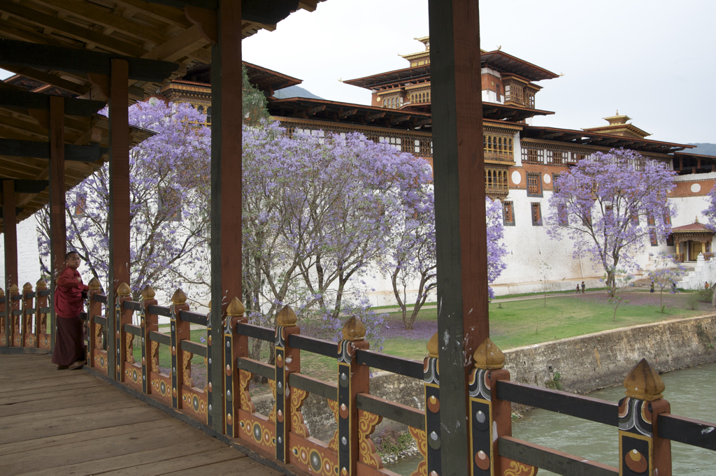 Punakha Cantilever Bridge, Bhutan